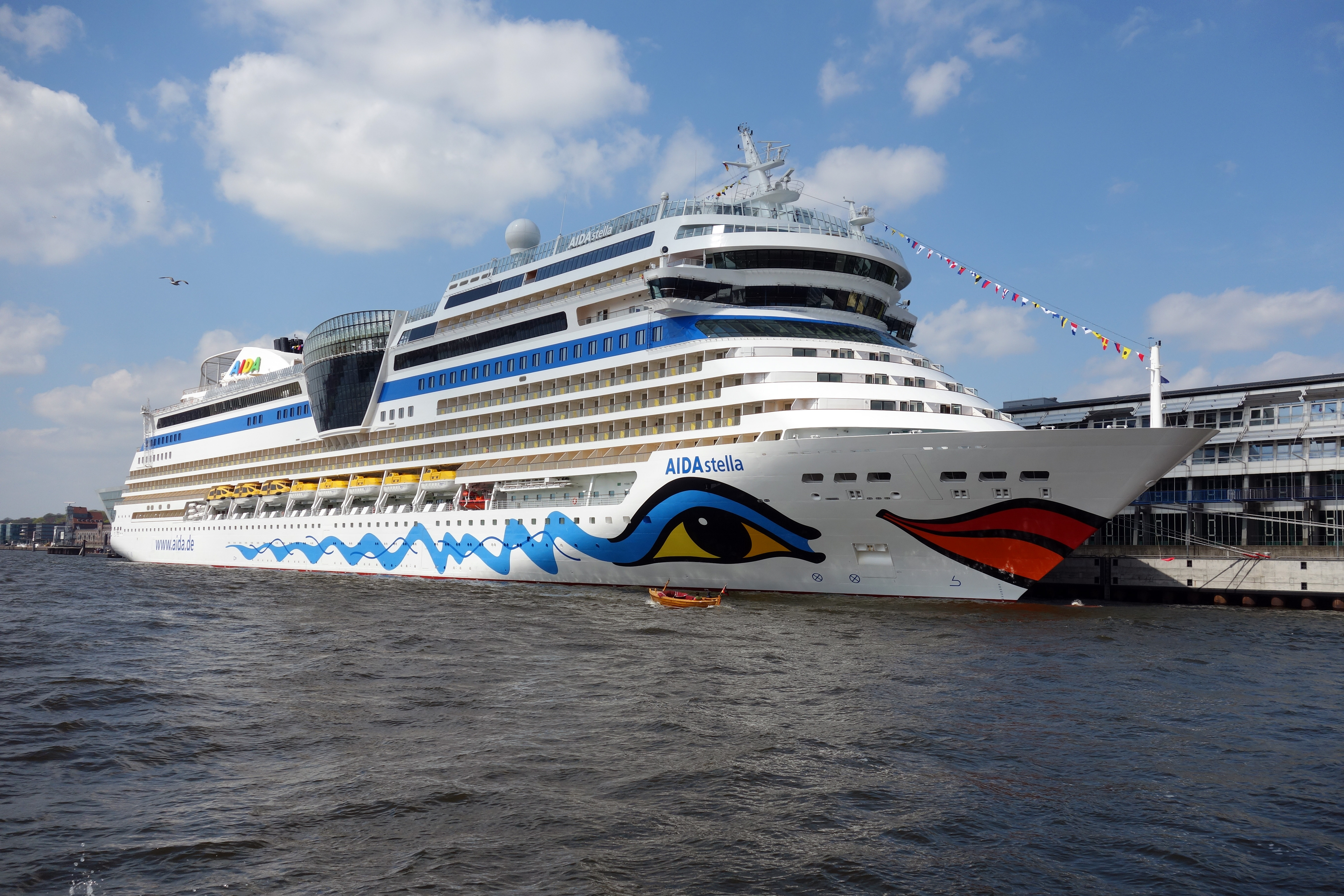 AIDAstella